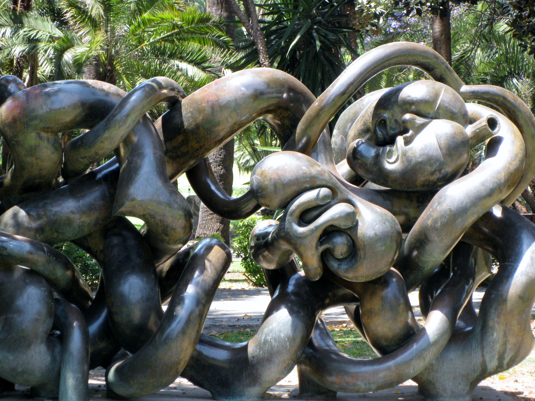 Escultura en los Jardines de Picasso, Málaga, España.